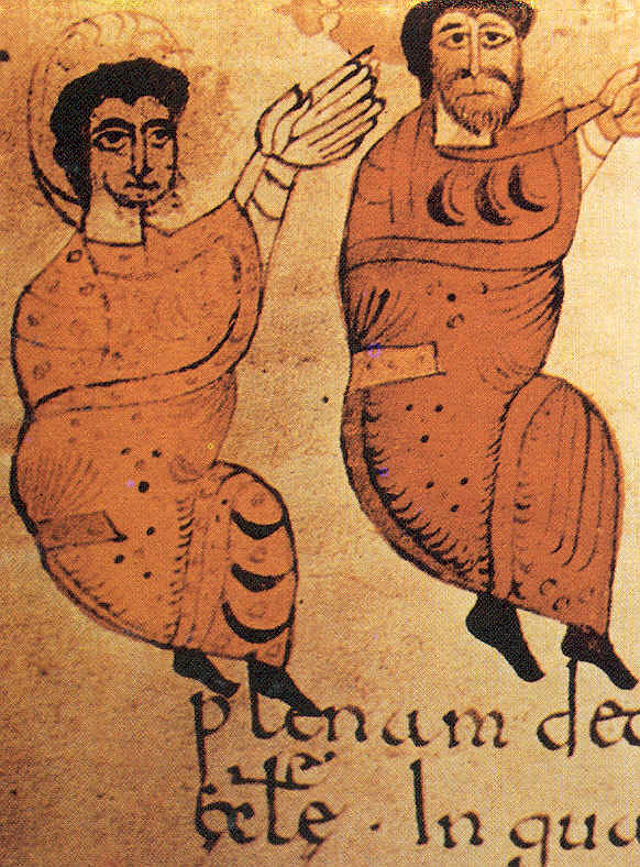 Miniatura de la primera mitad del siglo XII que representa a Sancho Ramírez de Aragón y a su padre Ramiro I de Aragón (con barba)